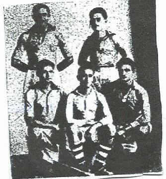 Photo paru au match du 23 décembre 1930 montrant les champions d'Egypte de rink hockey